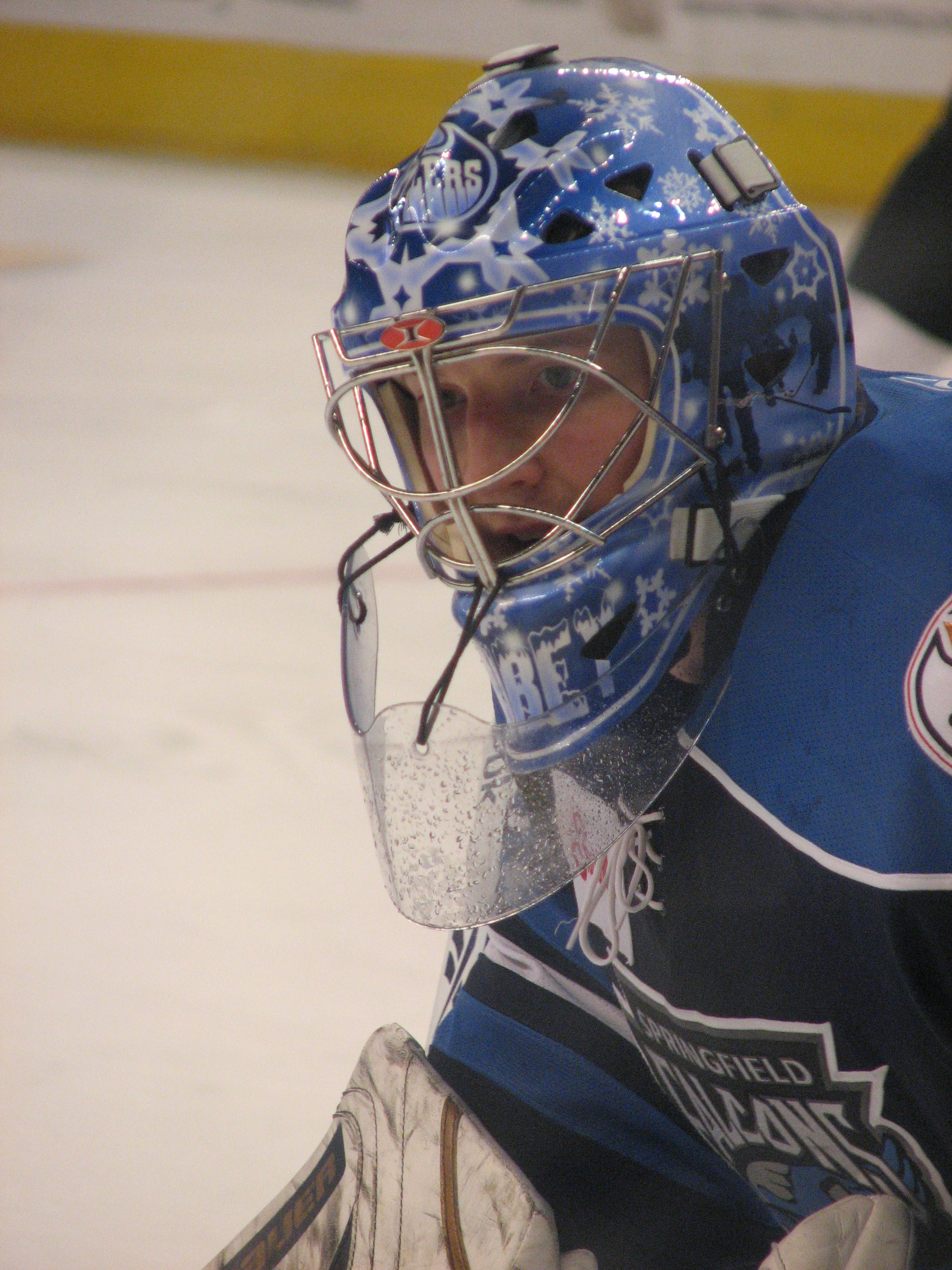 Devan Dubnyk, Springfield Falcon, Canadian ice hockey goaltender